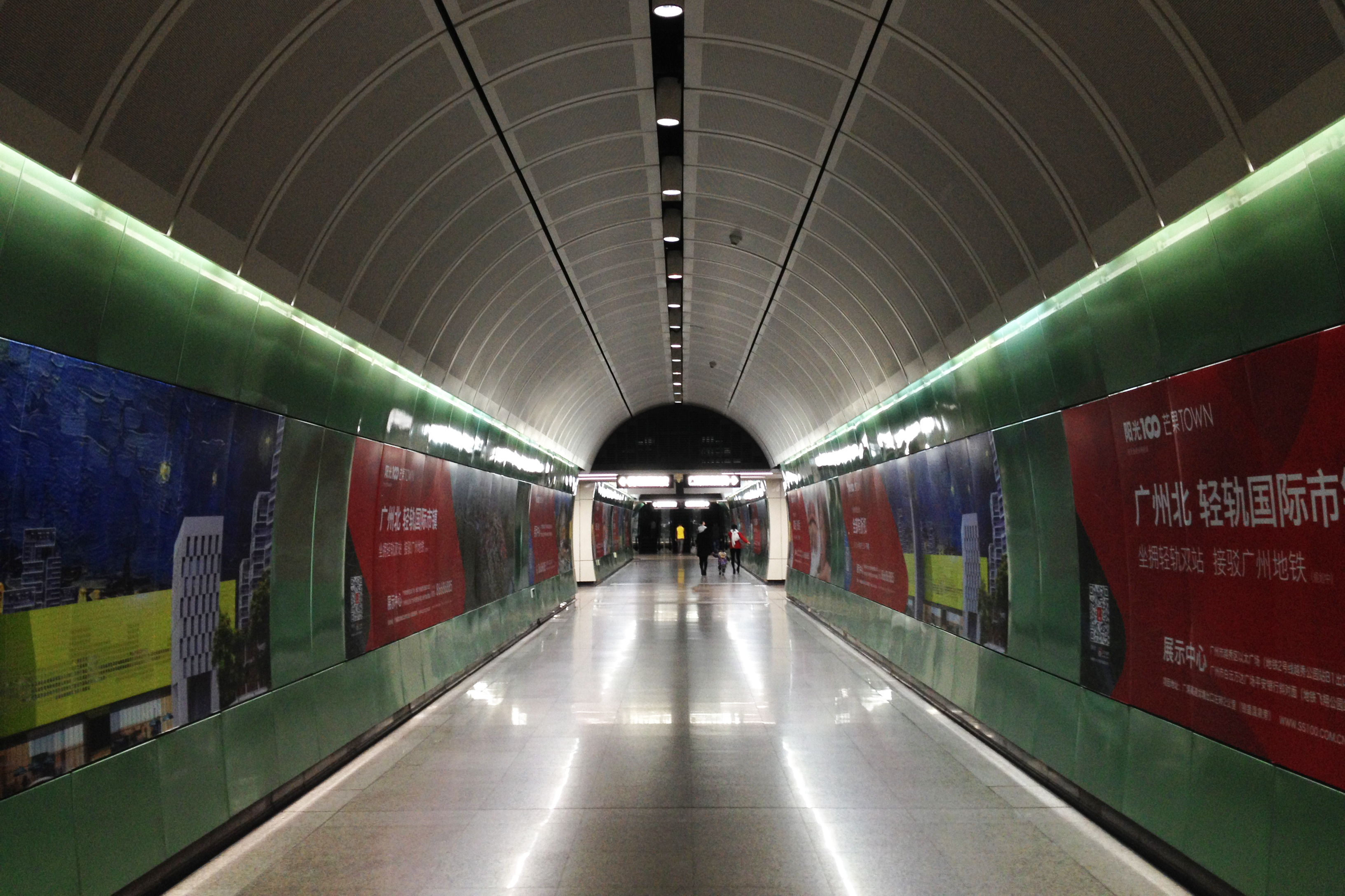 广州地铁越秀公园站的站厅通道